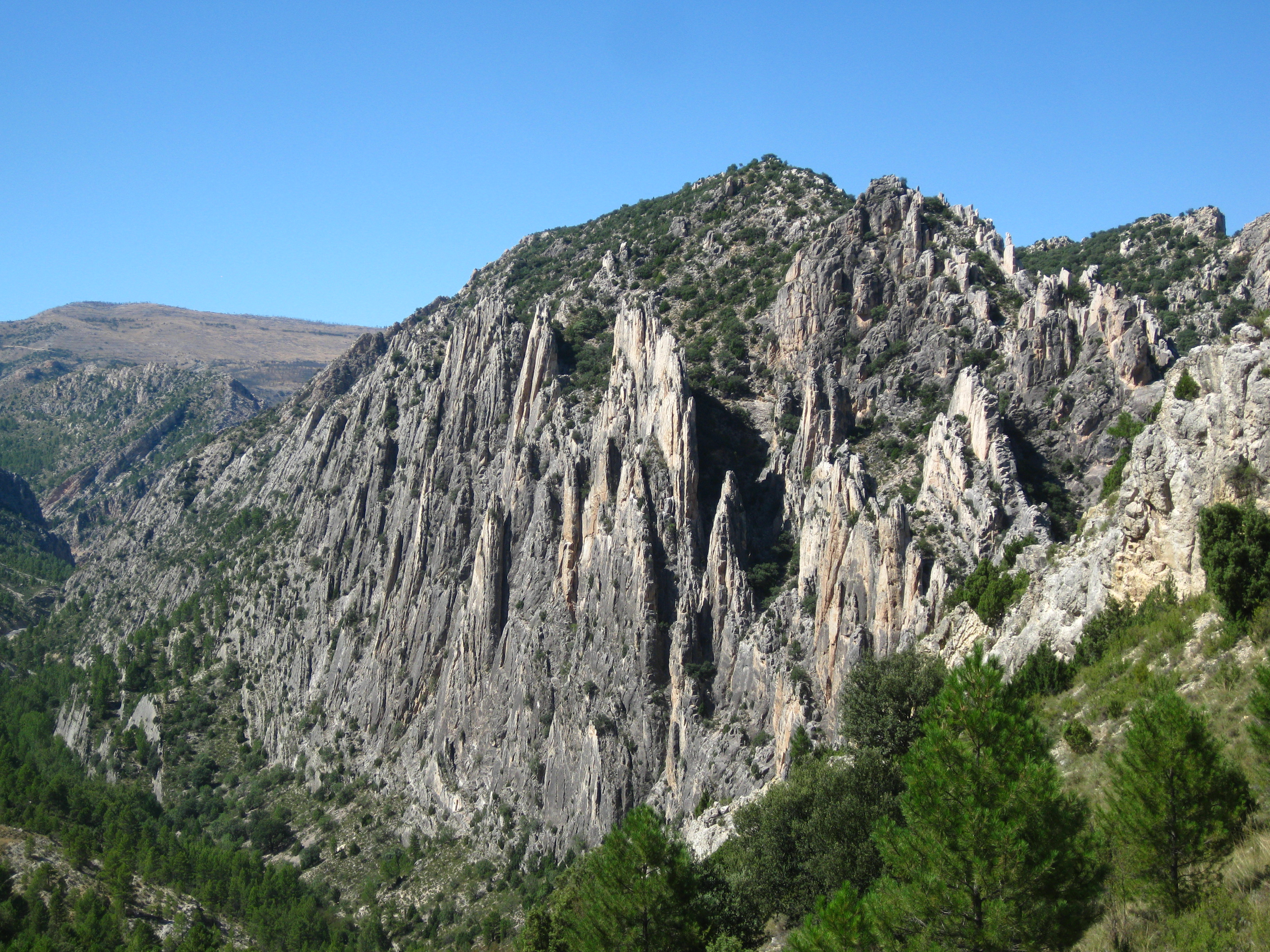 Organos de Montoro, Maestrazgo mountain range in Teruel.